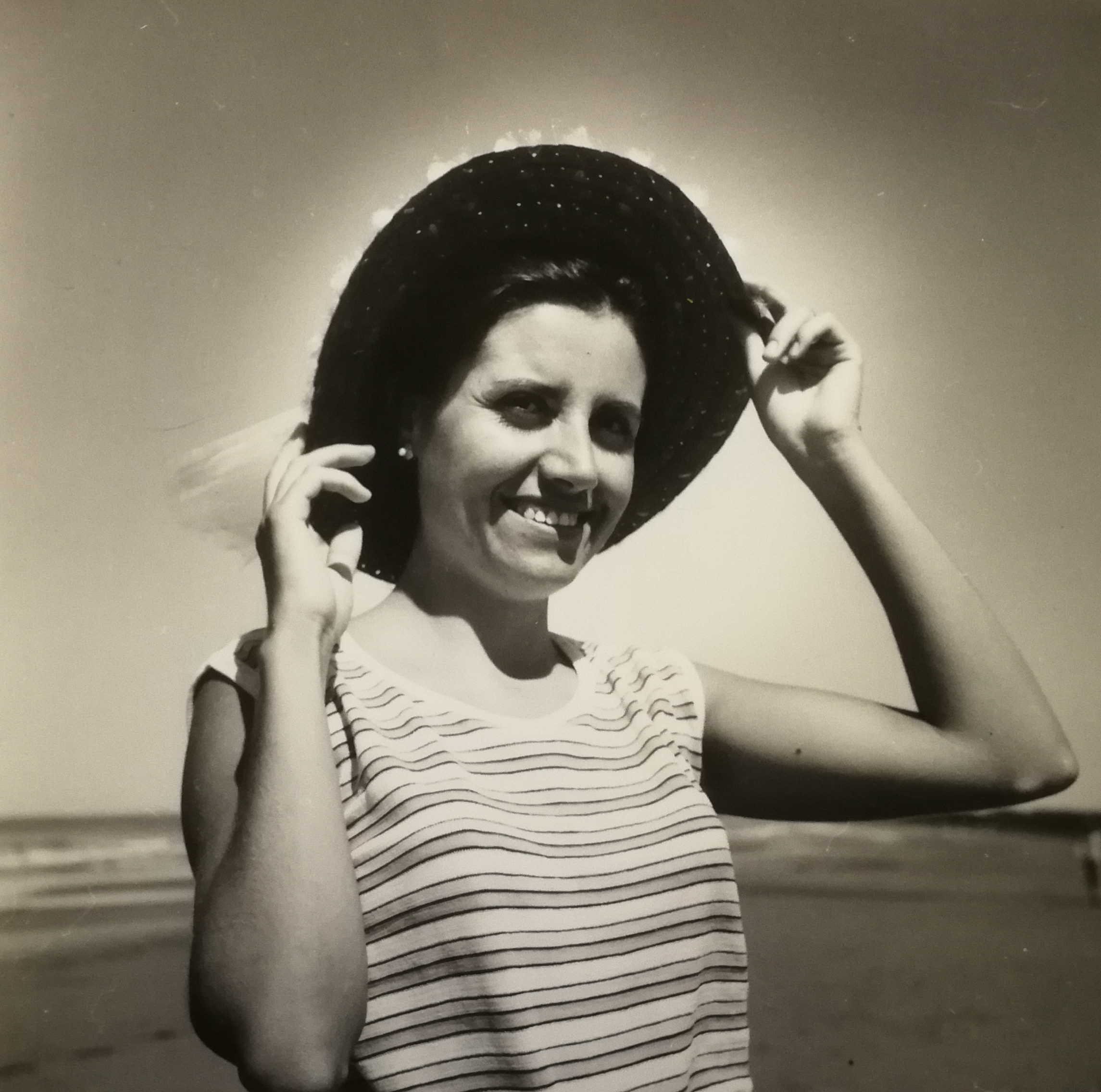 Retrato de Estela Mary Casé, realizado por Luis Victorino Savelli en 1967